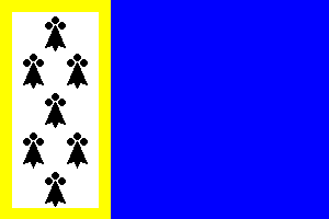 Bandera de Frúniz, en Vizcaya (España)